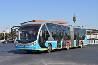 北京快速公交一号线无轨电车